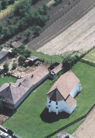 Papos, Hungary, aerialphotography. Múzeum, volt r.k. templom, gótikus eredetű, átalakítva 1830 körül